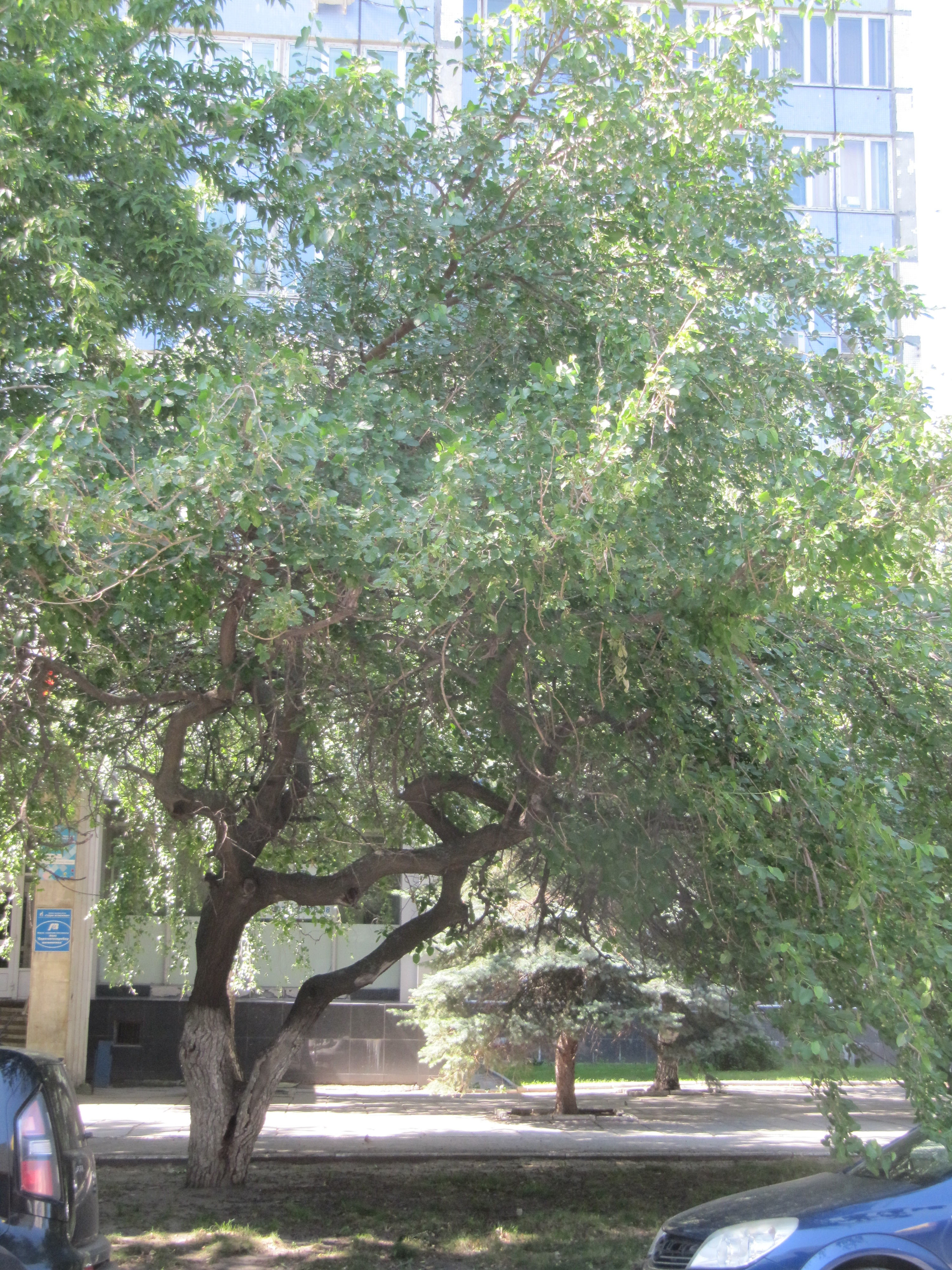 Шелковица или тутовое дерево на ул. Шелковичная (угол ул. Рахова), Саратов.